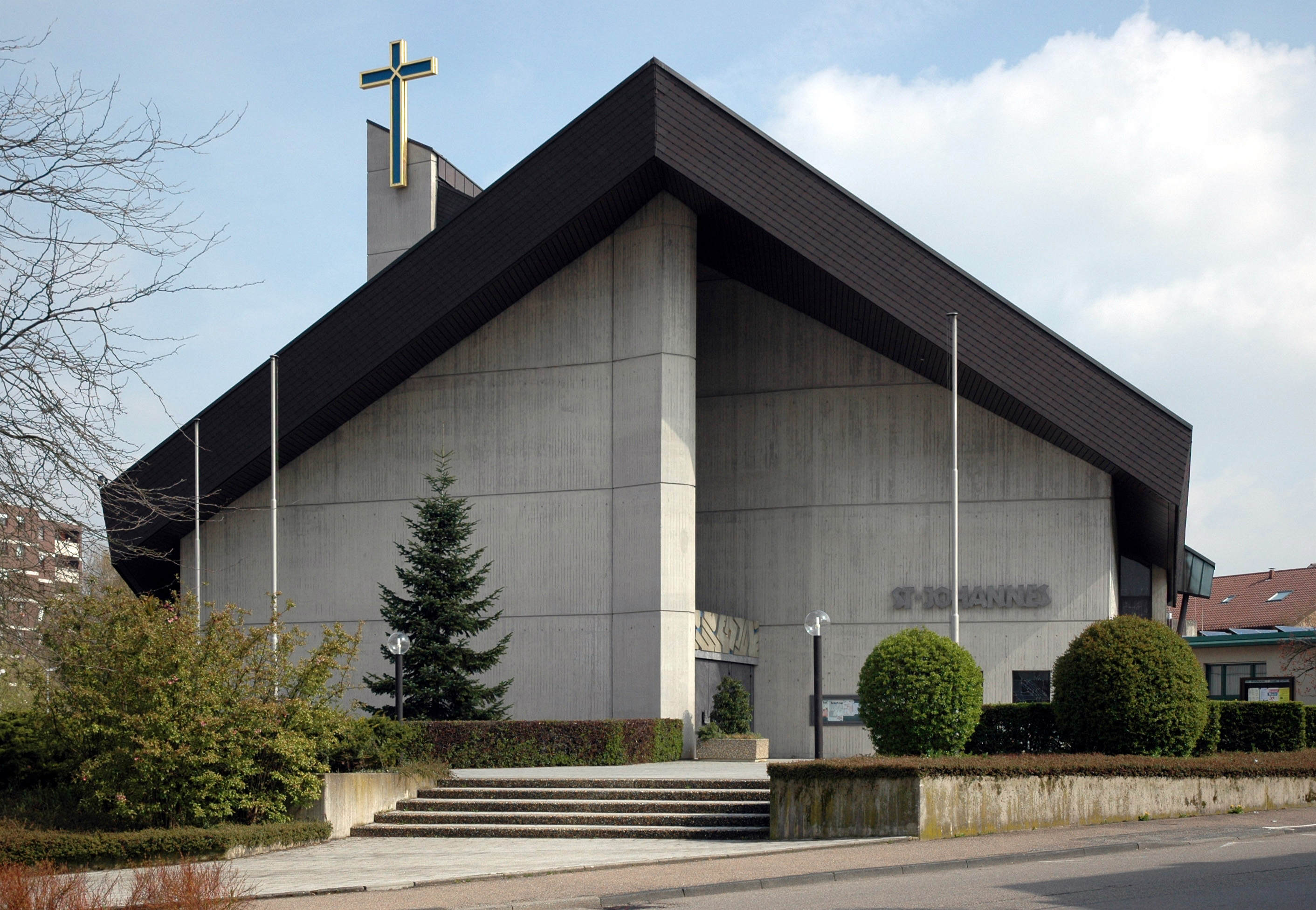 Kath. Kirche St. Johannes in Neckarsulm.